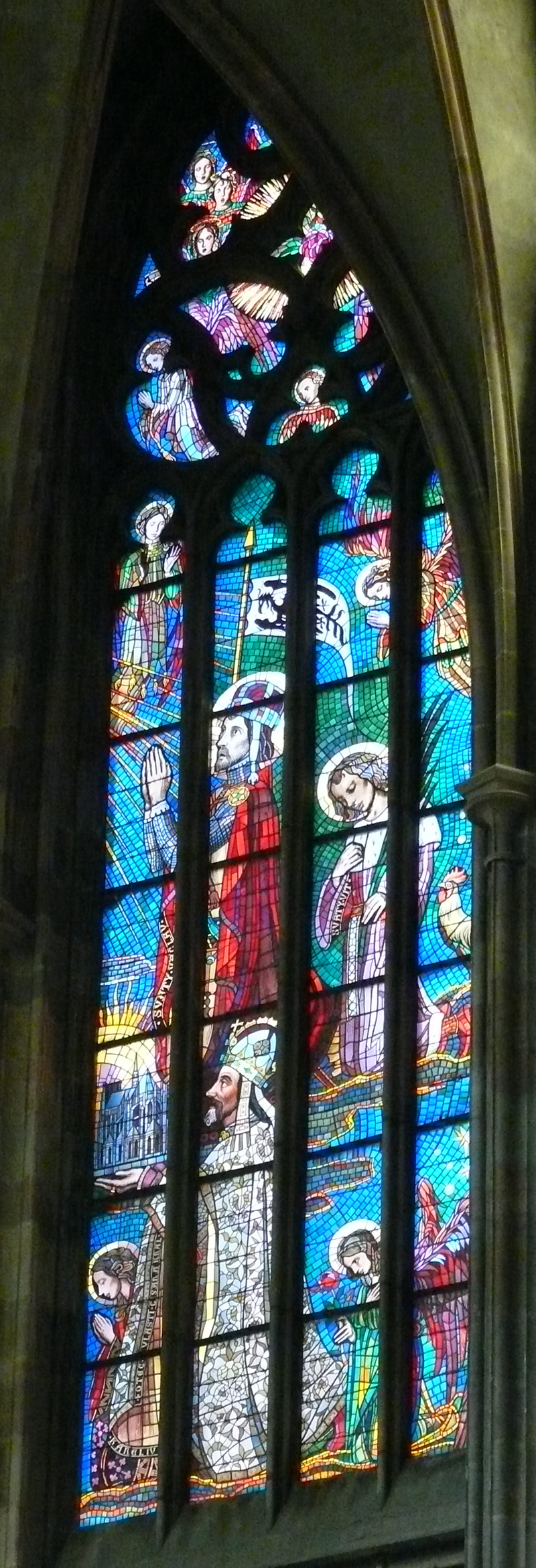 Vitráz Maxe Švabinského ve Vítovi